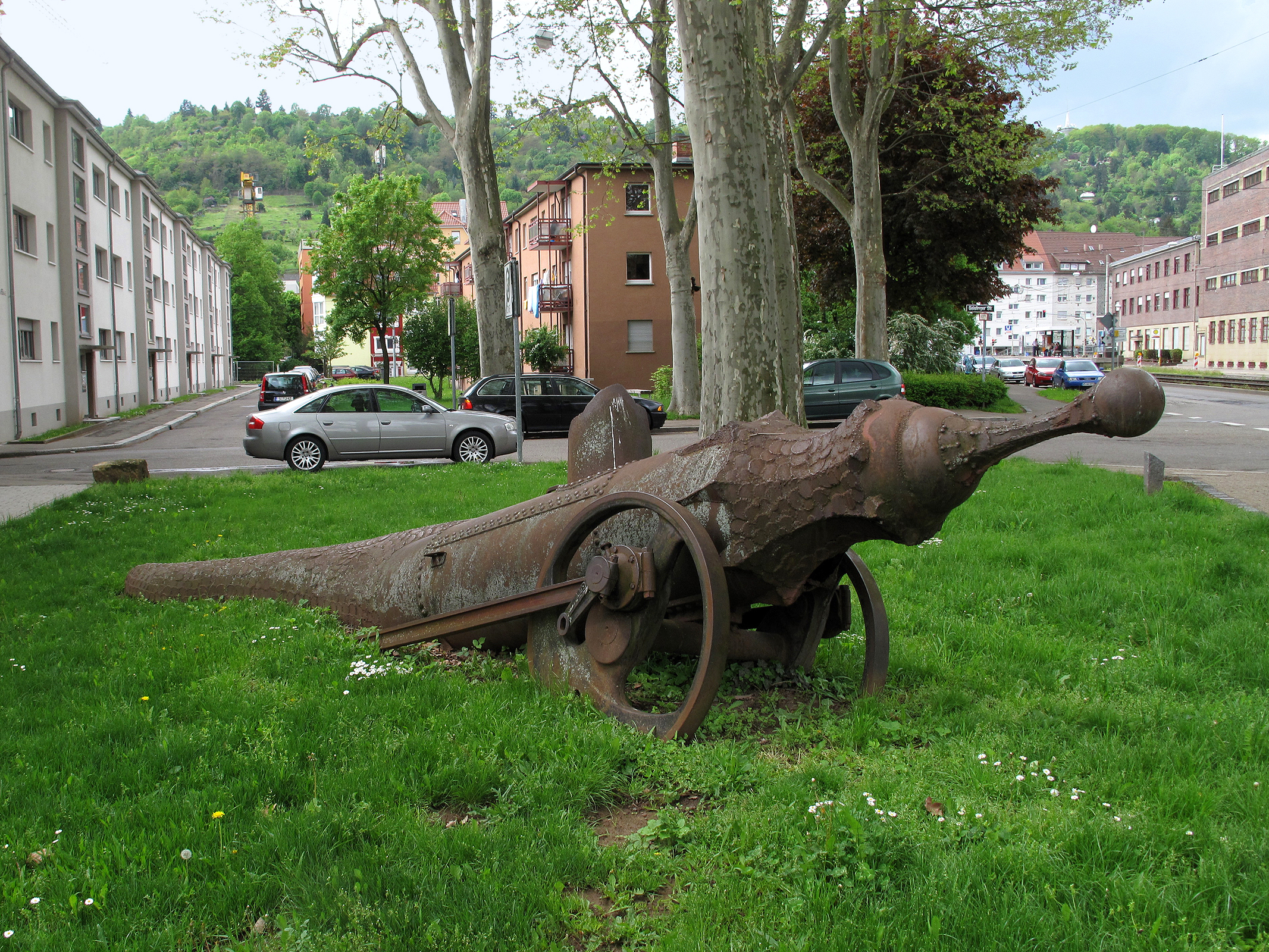 Lutz Ackermann, o. T., 1987, Stuttgart-Wangen, Insel-/Geislinger Straße